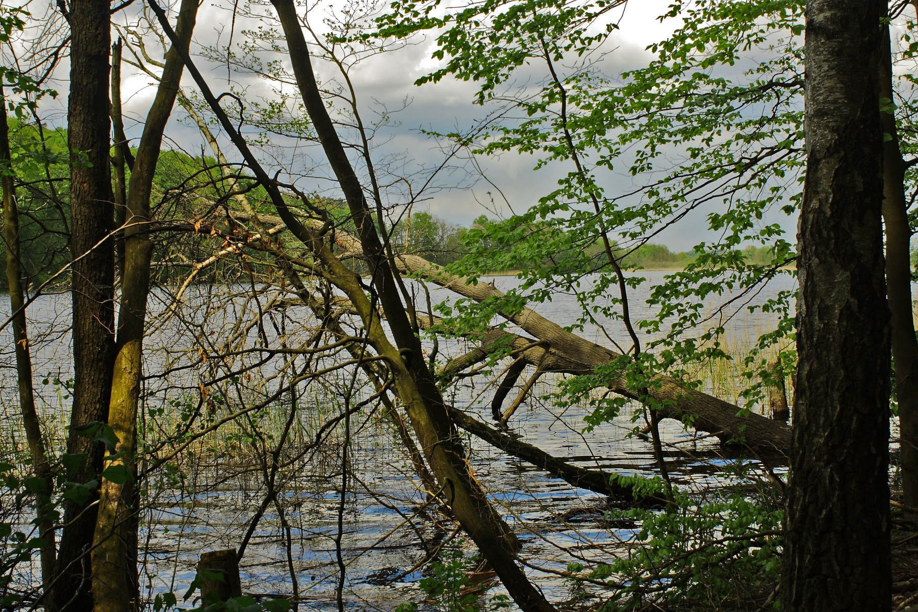 Südufer Rosinsee am Rosinfenn